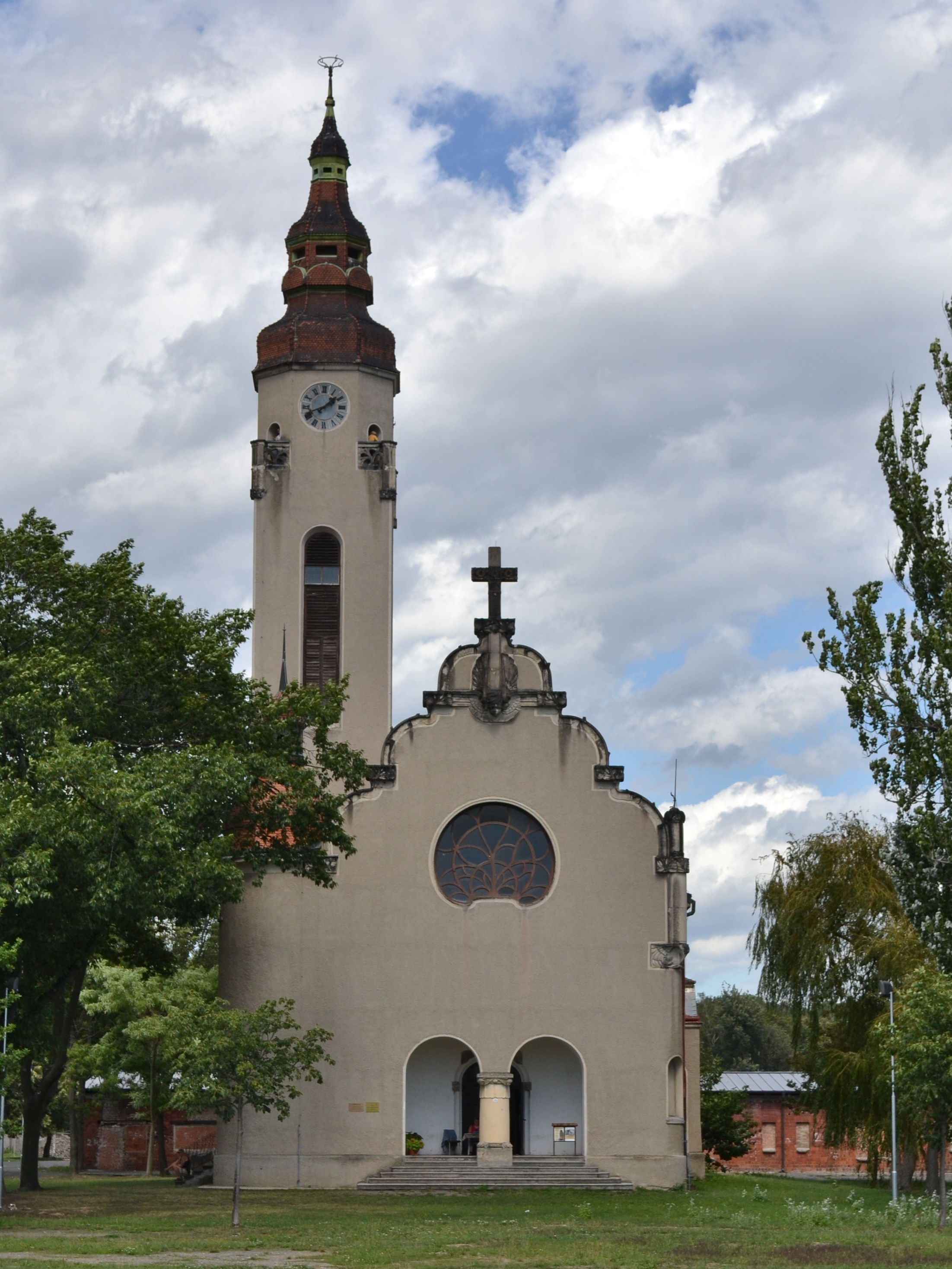 Duchcov - kostel Církve československé husitské